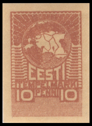 Фискальная марка Эстонии первого выпуска